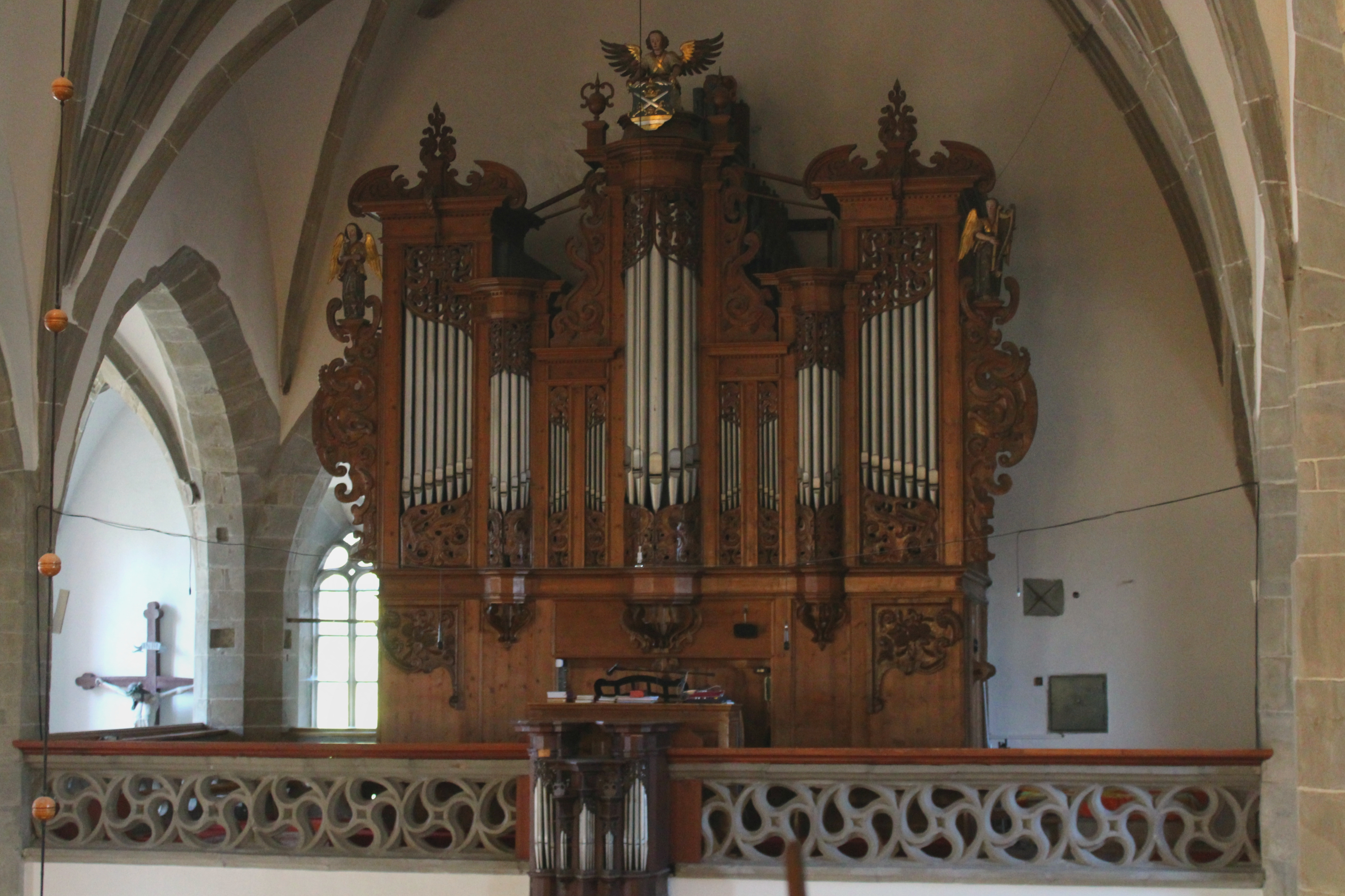 Hlavný organ Rieger-Krnov z roku 1926.